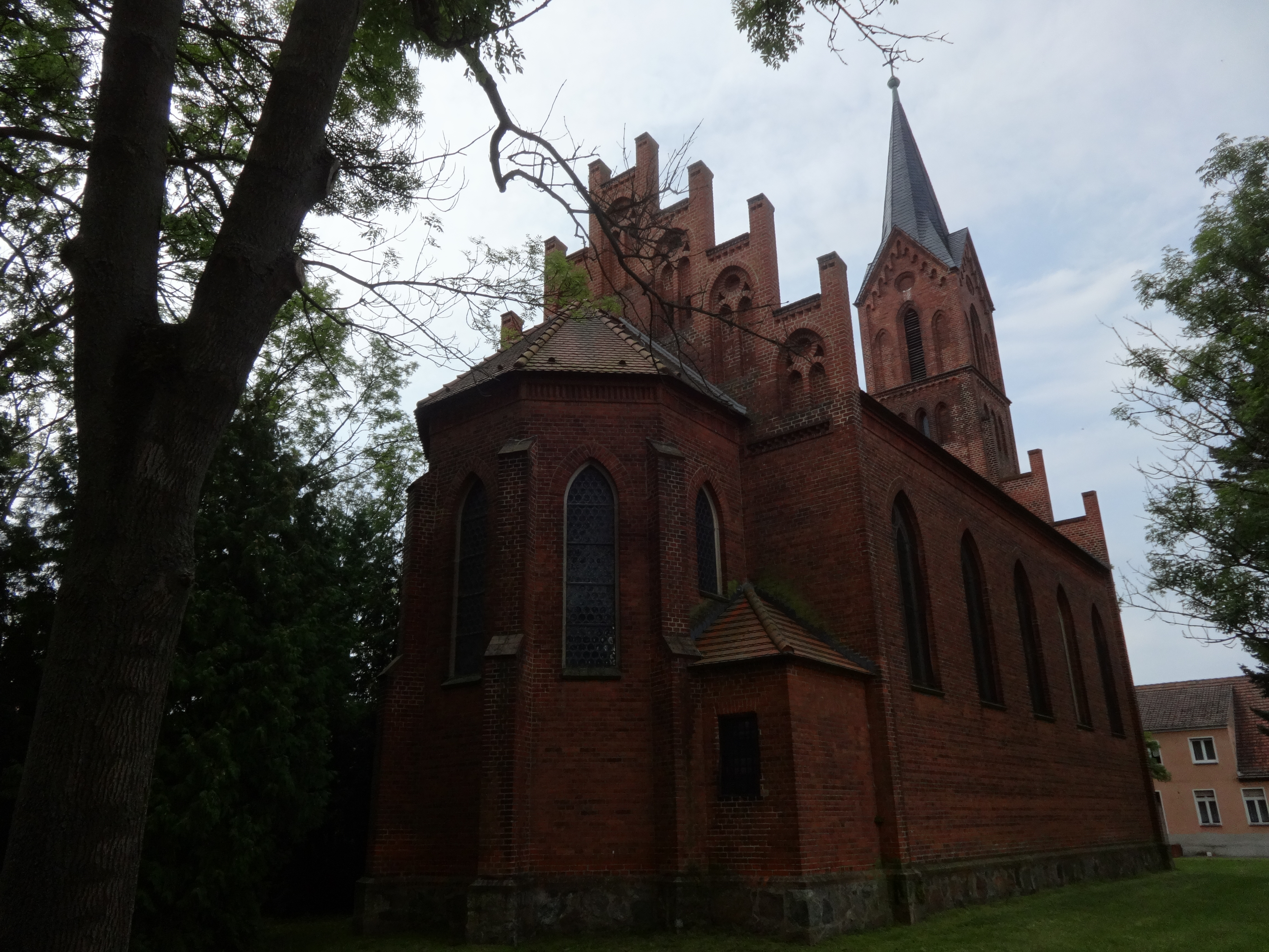 Die neogotische Saalkirche in Grüna (Stadt Jüterbog) entstand in den Jahren 1873 und1874 auf dem Fundament eines mittelalterlichen Vorgängerbaus. Die Kirchenausstattung ist bauzeitlich.